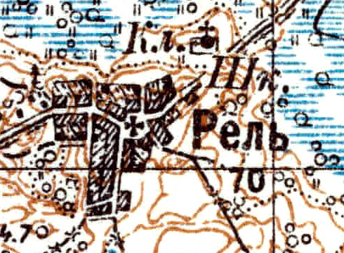 Топографическая карта Ленинградской области, квадрат VIc-26 (Ставотино), деревня Рель